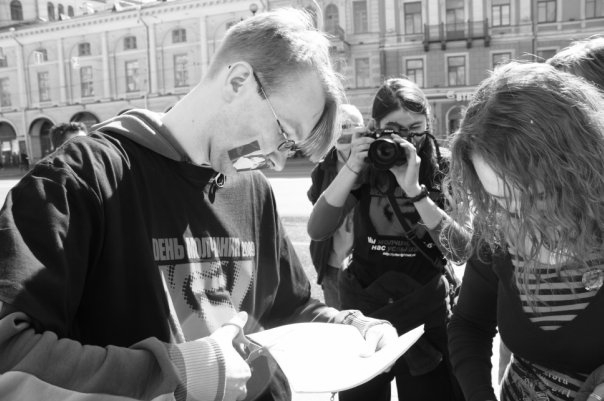 На переднем плане Валера Созаев. Тогда еще молодой активист.